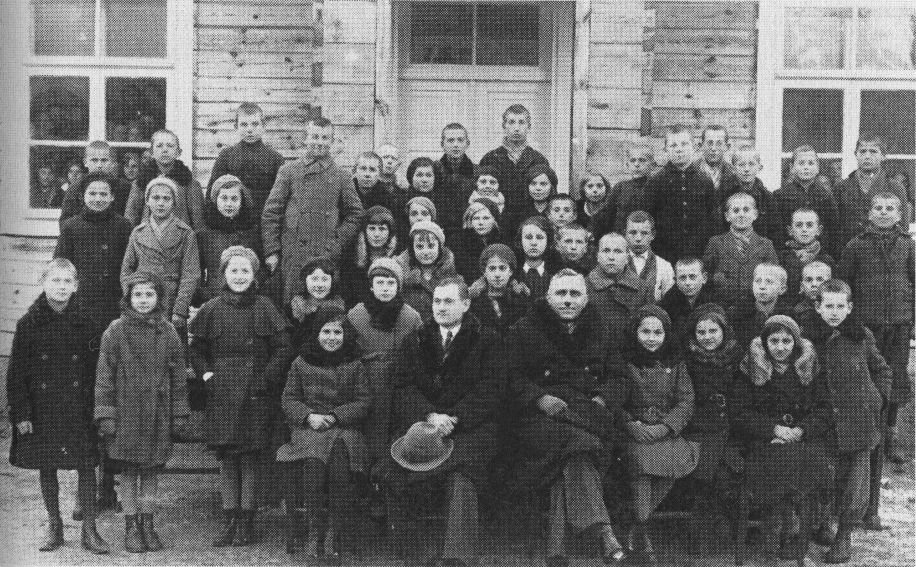 Klasa VI w 7-letniej Szkole Powszechnej w Nowojelni. Od lewej siedzą: Klemens Szkudlarek - nauczyciel śpiewu (późniejszy członek AK Okręgu Nowogródzkiego) i Jan Tabisz (lub Tobisz) - kierownik szkoły (zamordowany tuż po wkroczeniu Armii Czerwonej do Polski). Z archiwum rodzinnego Haliny Kustry z Łodzi.